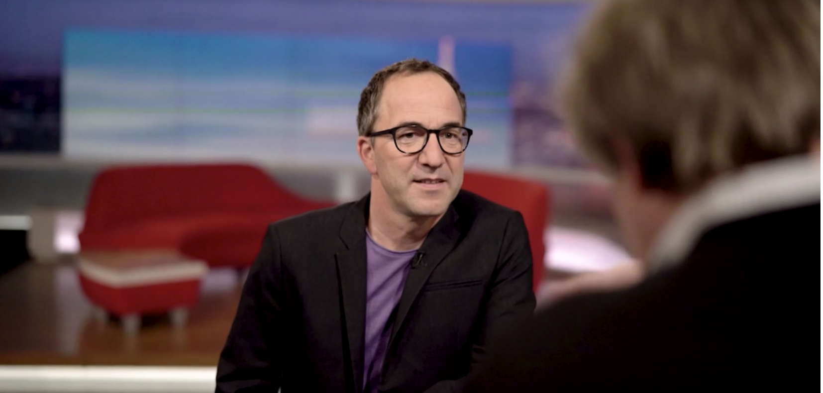 Jürgen Hörig im fernsehstudio des SWR